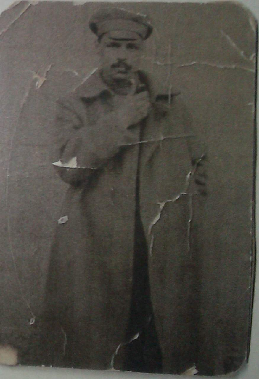 Zarezankov (1890-1938)